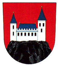 Podhradí nad Dyjí znak